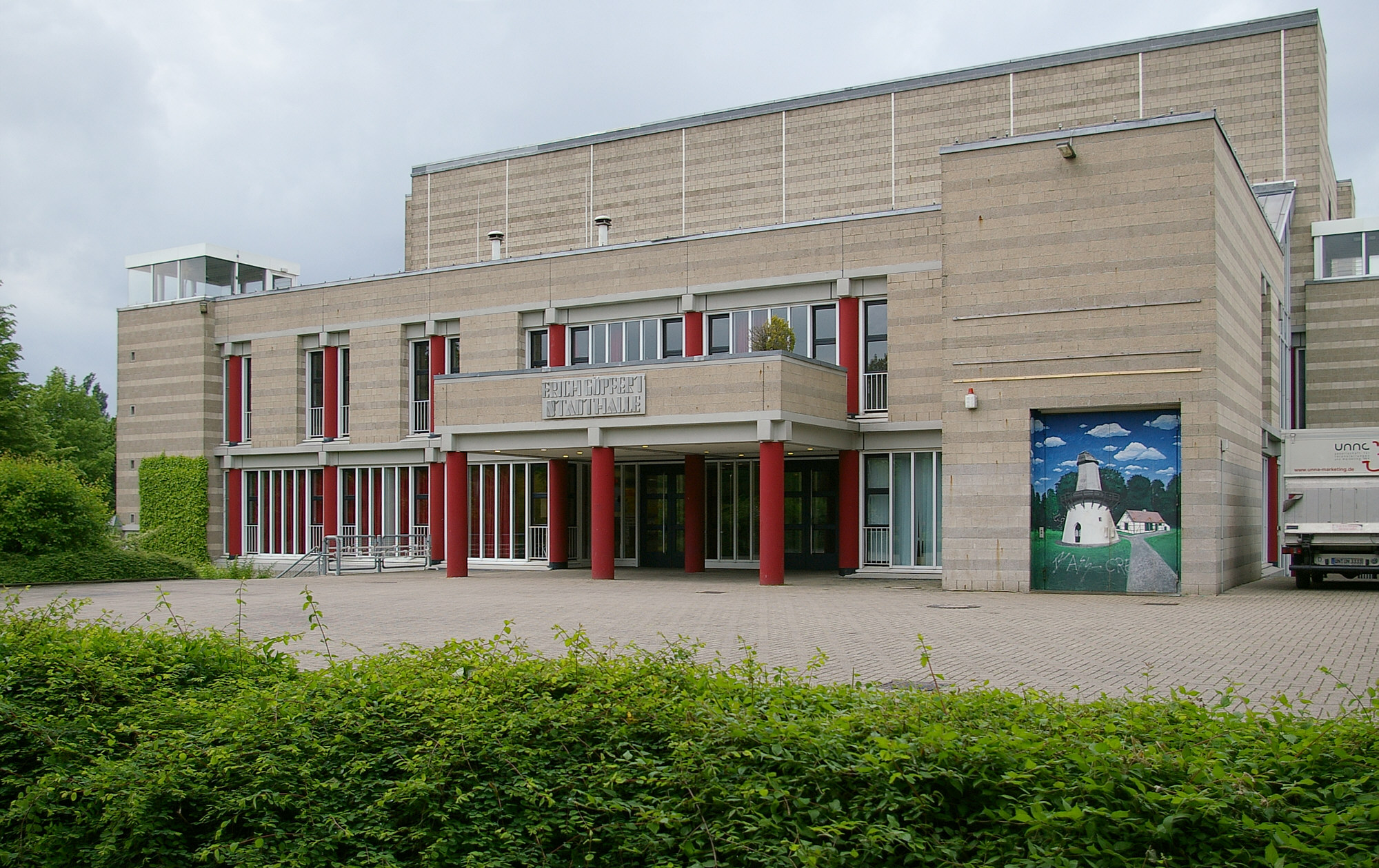 Stadthalle Unna, benannt nach Erich Göpfert, Bürgermeister in Unna von 1959 bis 1984